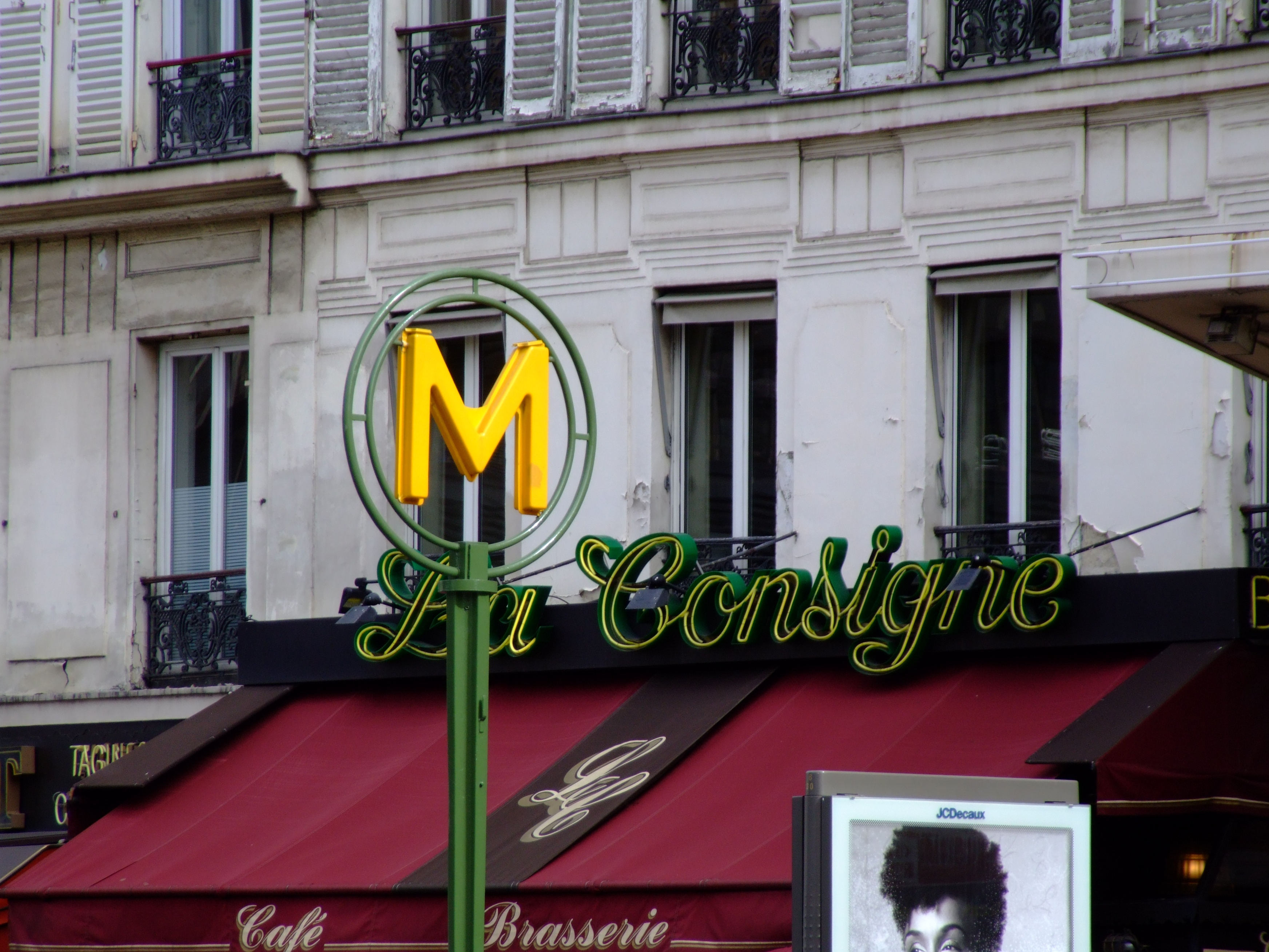 Mat candélabre d'un des accès à la station de métro Montparnasse - Bienvenüe devant la Brasserie La Consigne, 71 Boulevard du Montparnasse, VIe arrondissement, Paris, France.